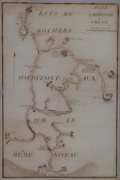 Plan der Großen Labyrinth-Höhle auf Kreta nahe Mires (Messara-Ebene), nach Vermessung der Höhle 1783, veröffentlicht 1839